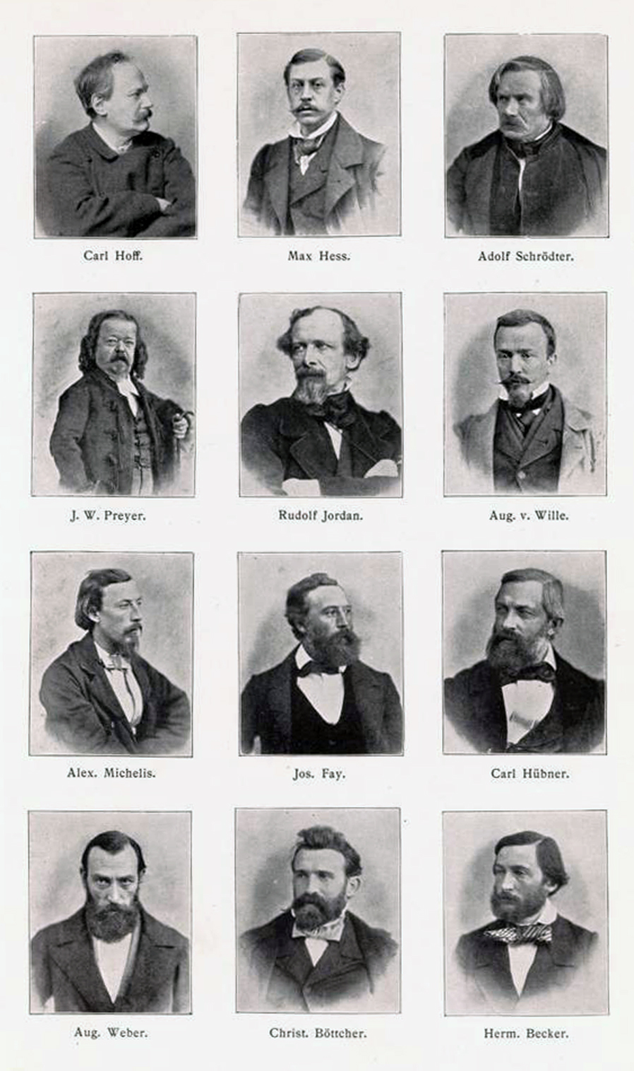 Malkasten Künstlerverein Mitglieder in der Zeit zwischen 1848 bis 1898: Carl Hoff, Max Hess, Adolf Schrödter, J.W. Preyer, Rudolf Jordan, August v. Wille, Alex. Michelis, Jos. Fay, Carl Hübner, Aug. Weber, Christ. Böttcher, Herm. Becker (Abbildung in Geschichte des Künstlervereins Malkasten von Eduard Daelen, 1898)